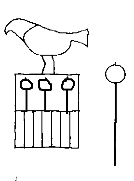 Tonritzung des Hedju (clay cutting of King Hedju)